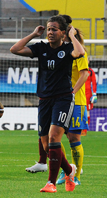 a_45_1754